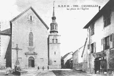 place de l'église Saint Maurice